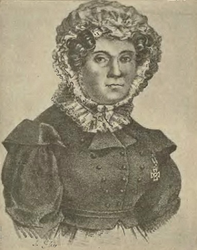 Joanna Żubrowa (1782-1852)